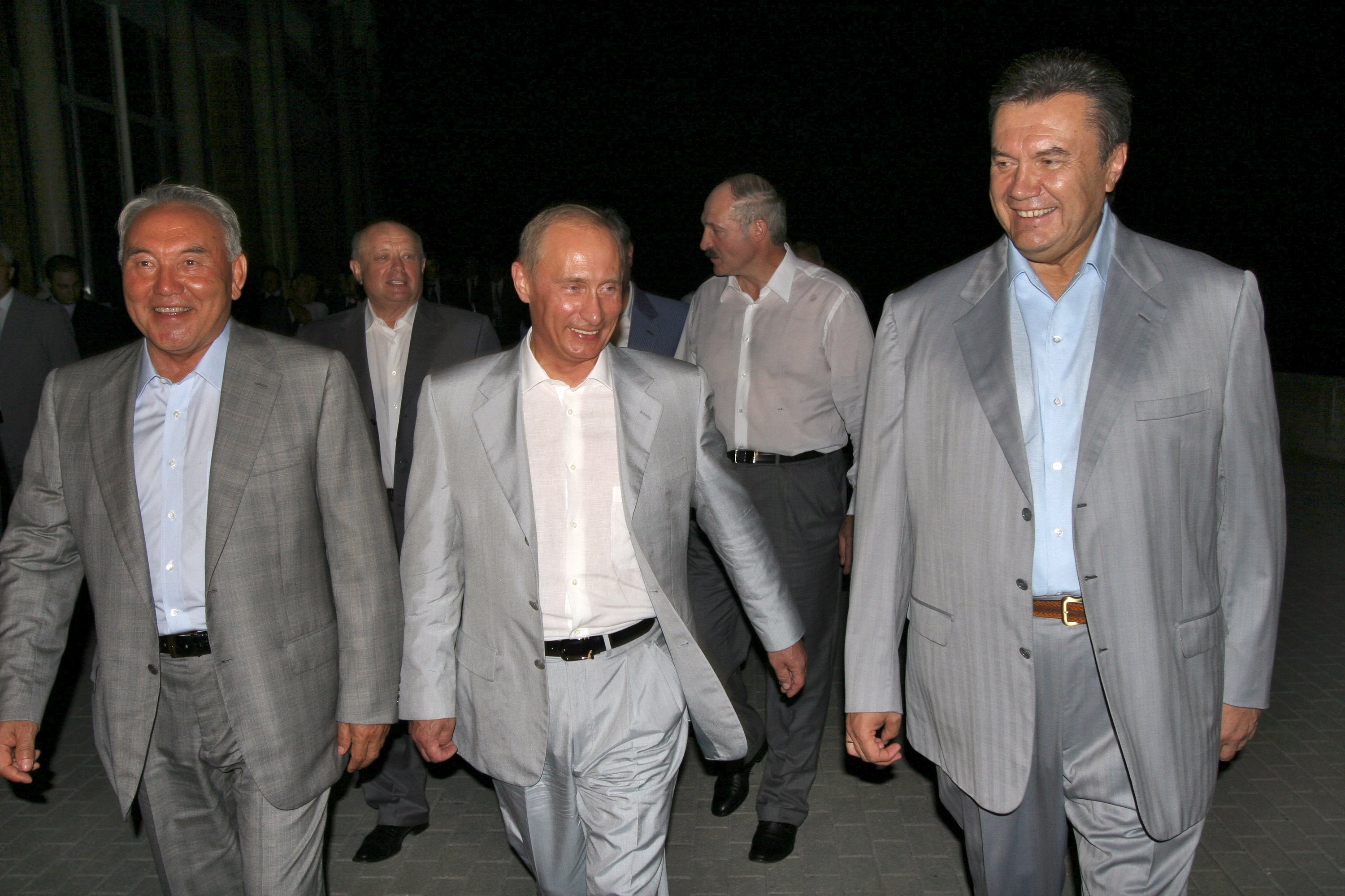 Виктор Янукович на встрече с президентами России, Белоруссии и Казахстана в резиденции "Бочаров Ручей".